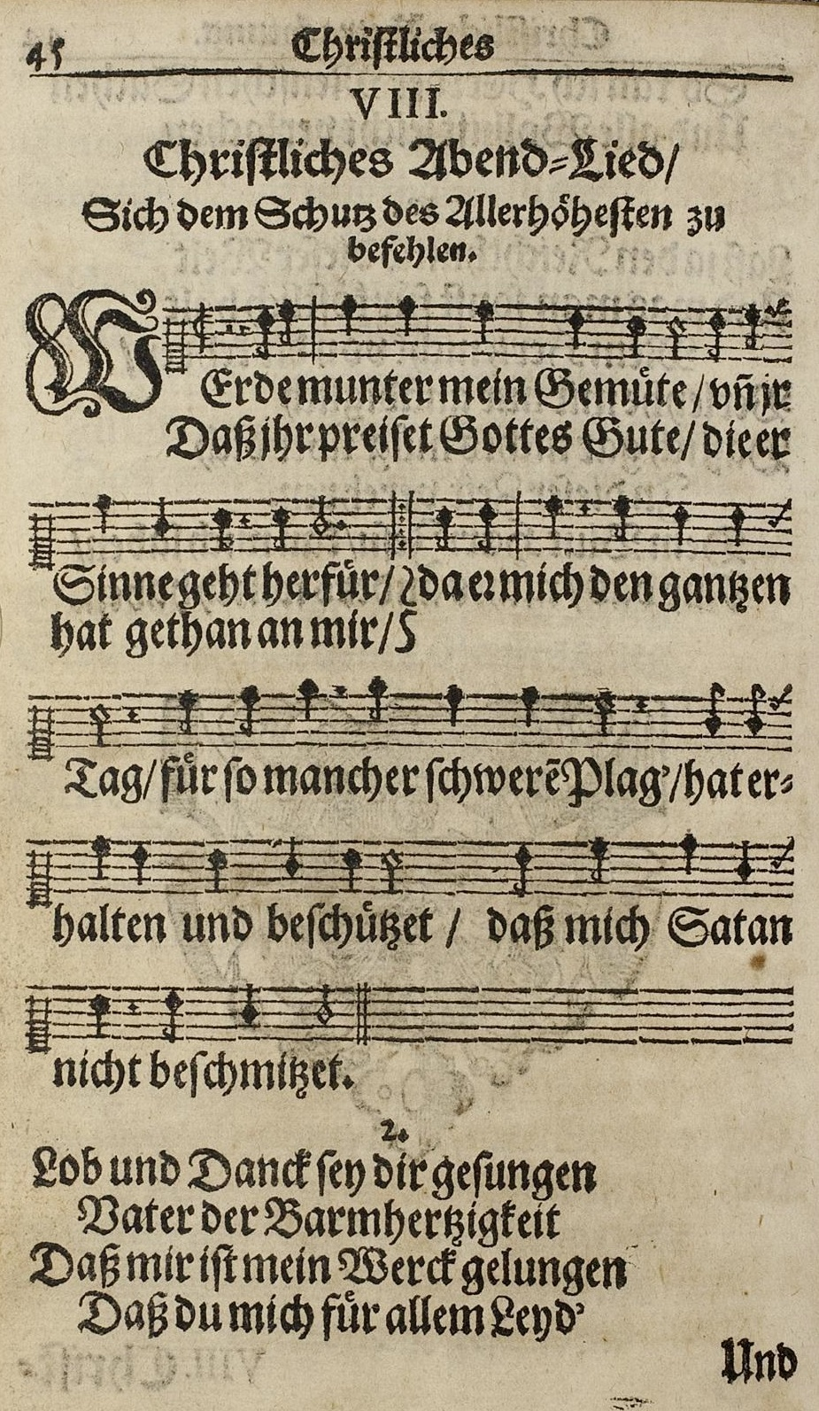 Werde munter, mein Gemüte, Erstdruck 1642